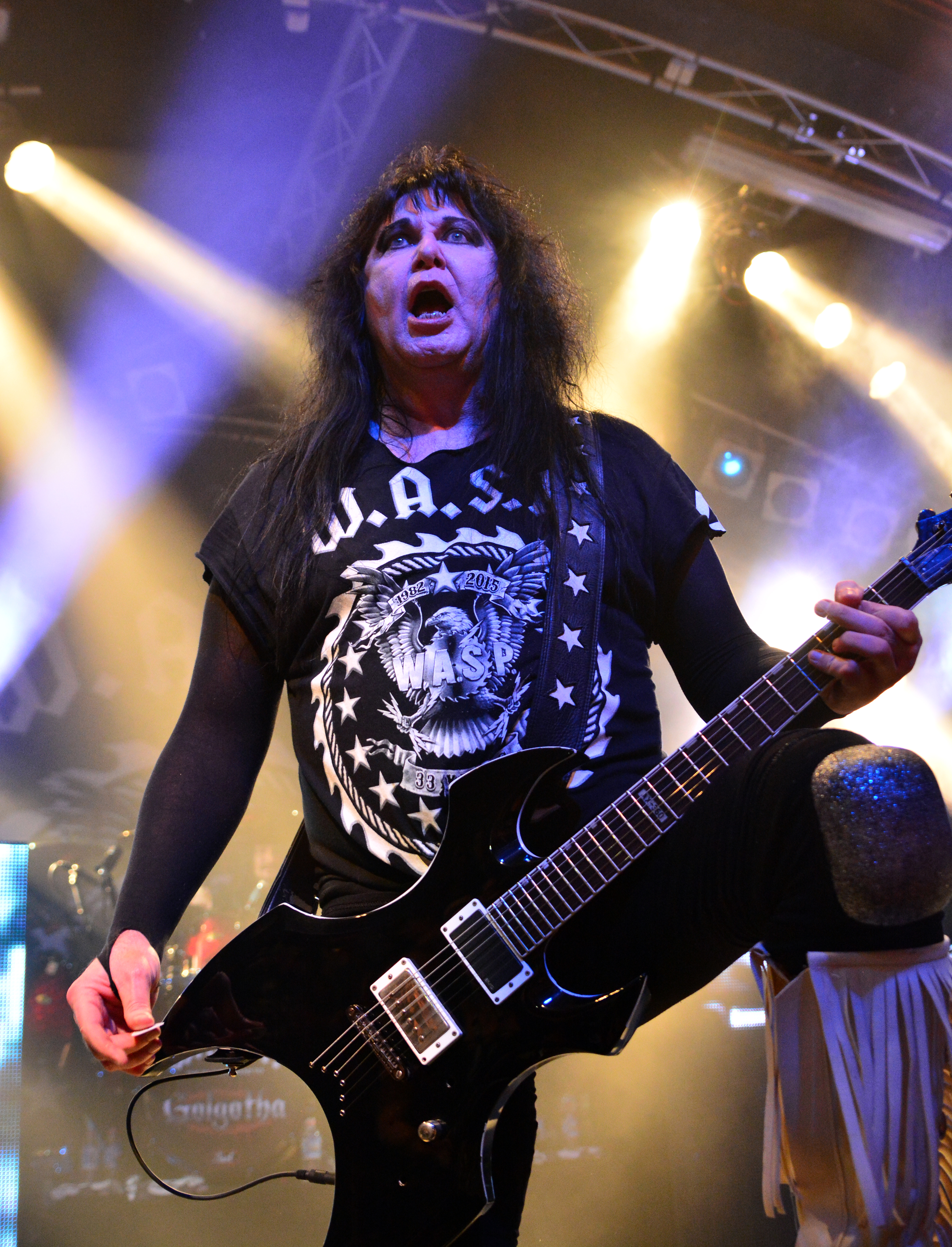 W.A.S.P. bei den Hamburg Metal Dayz 2015